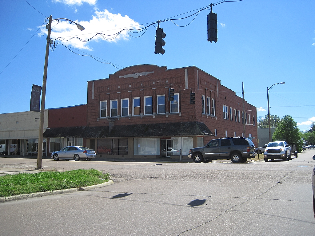 Brinkley, Arkansas